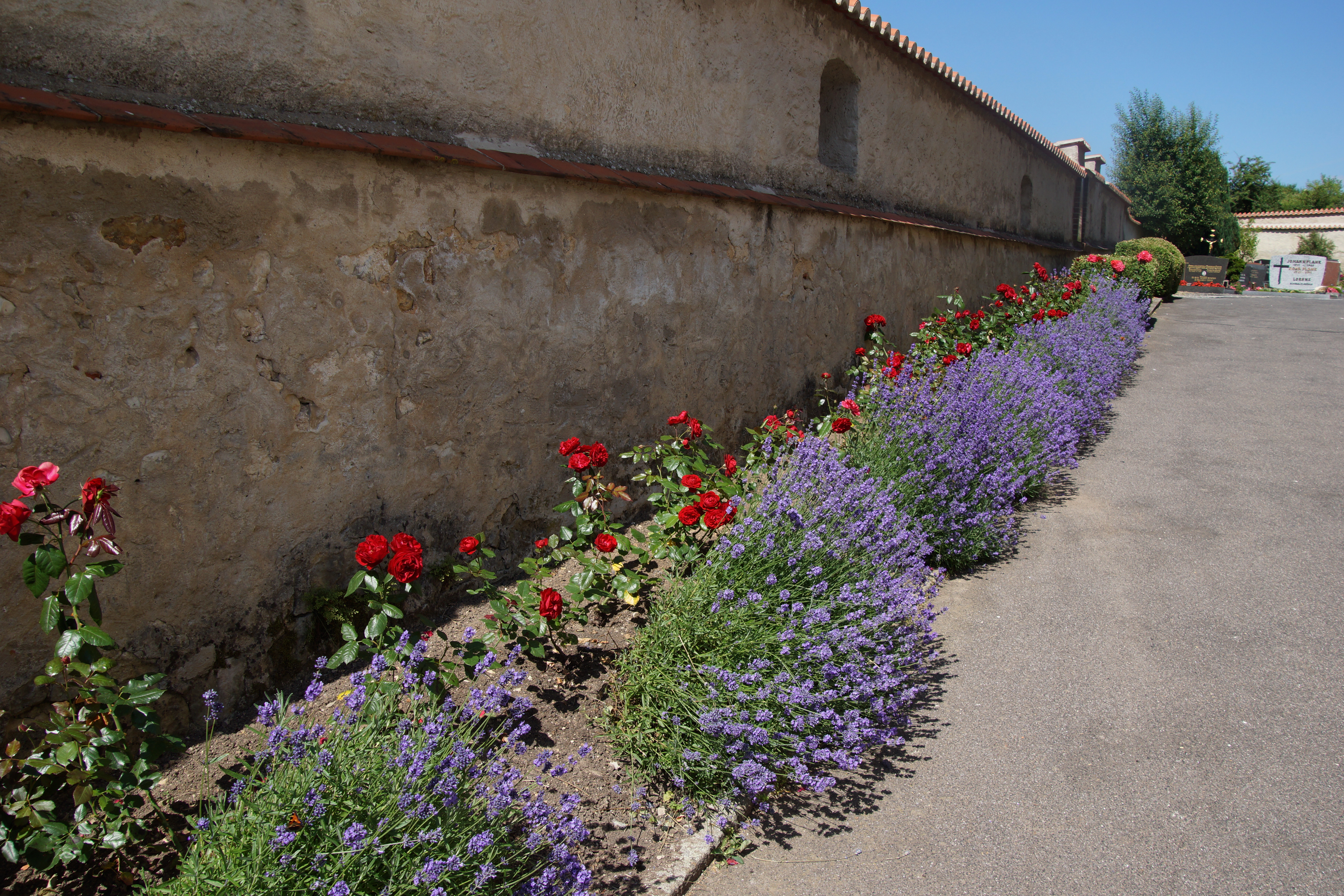 Die katholische Pfarrkirche St. Michael in Allersburg, Markt Hohenburg in der Oberpfalz